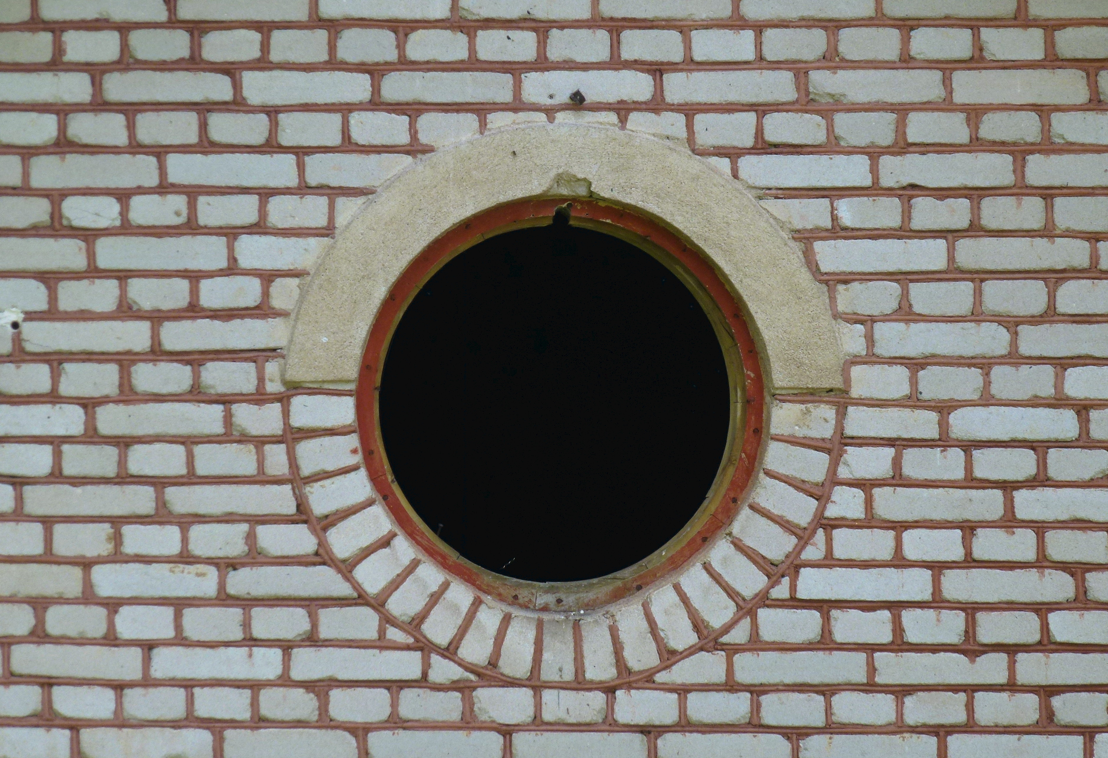 Laggaruddens pumpstation, fasaddetalj